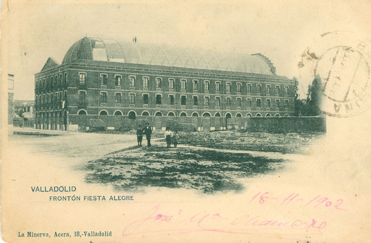 Frontón Fiesta Alegre - Valladolid - Postal Color